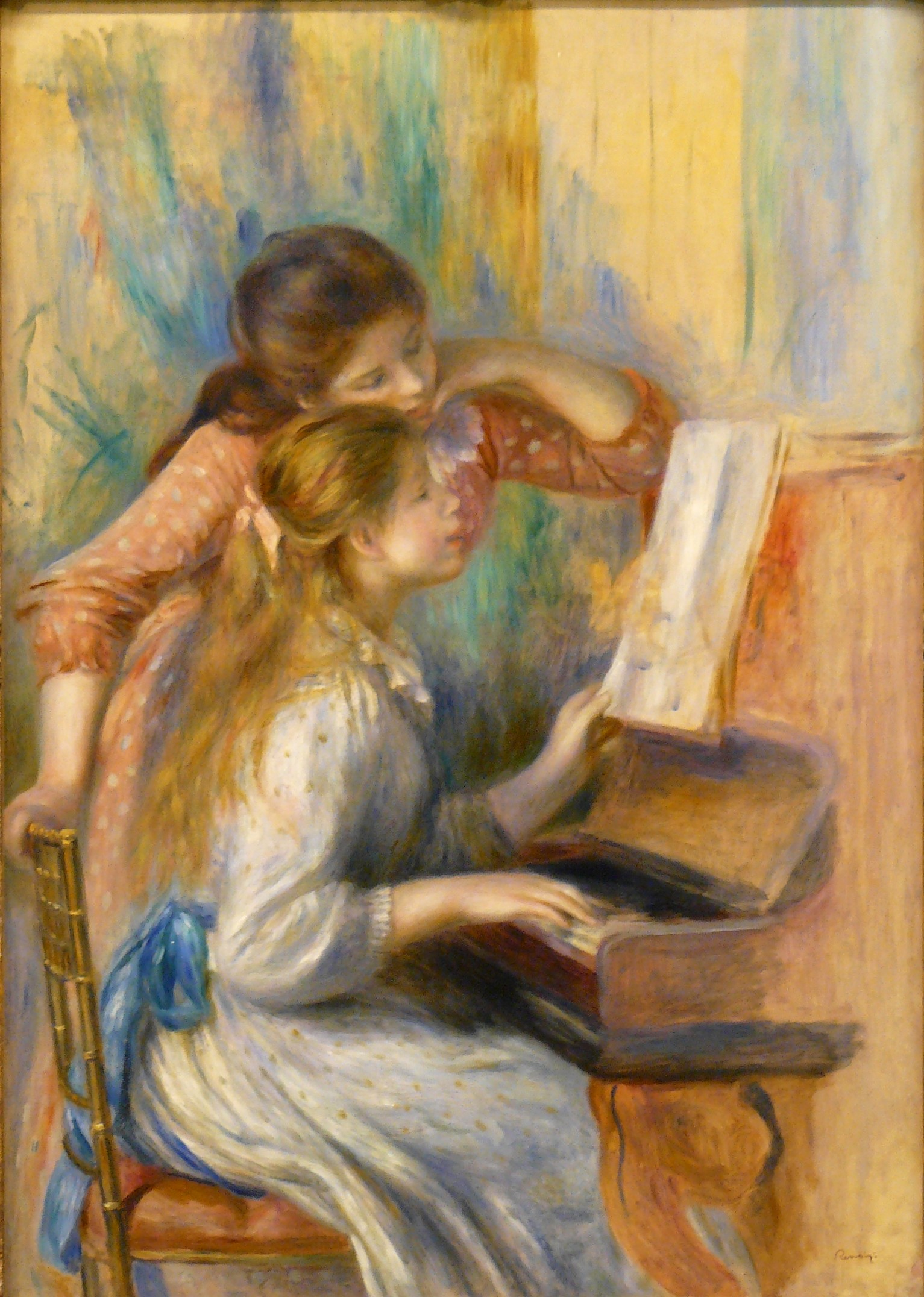 Pierre-Auguste Renoir, Jeunes filles au piano, vers 1892 - Musée de l'Orangerie, Paris - Inv. n° RF 1960-16